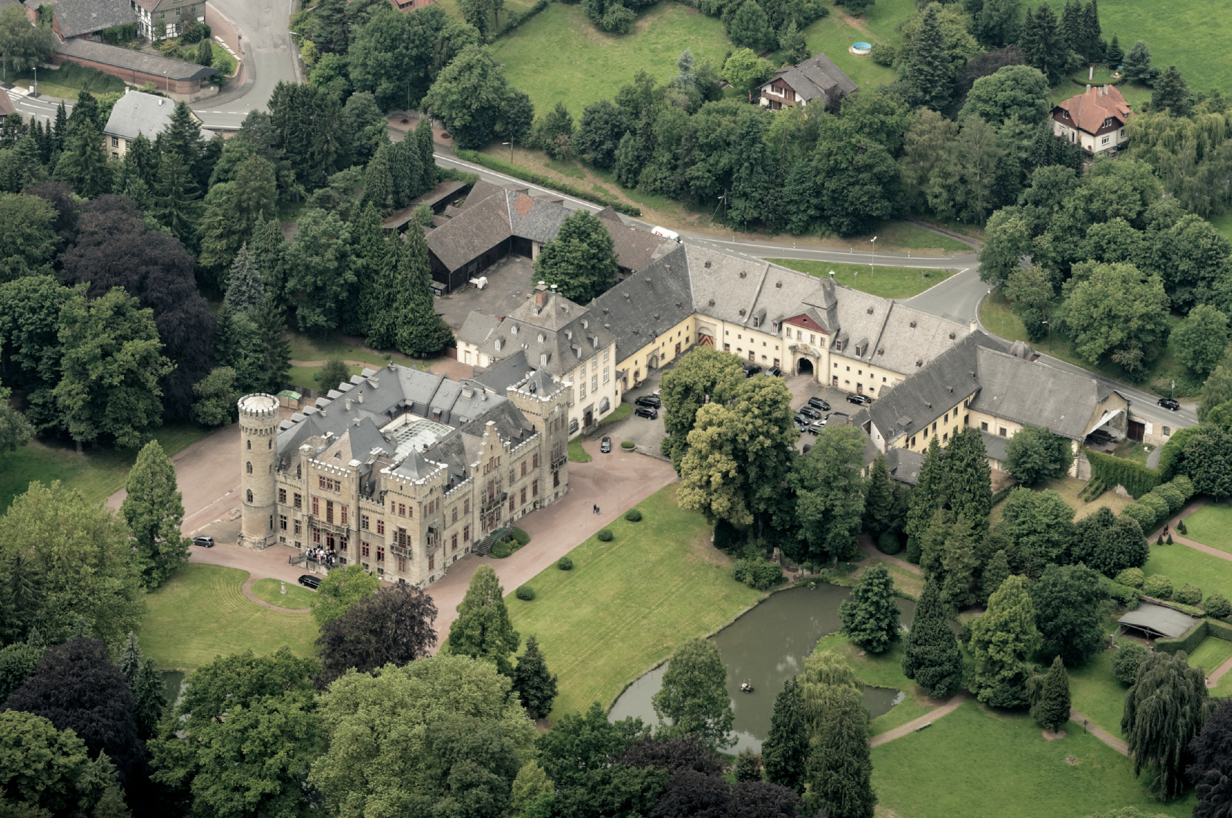 Fotoflug Sauerland Nord. Arnsberg-Herdringen, Schloss Herdringen The making of this document was supported by the Community-Budget of Wikimedia Germany.